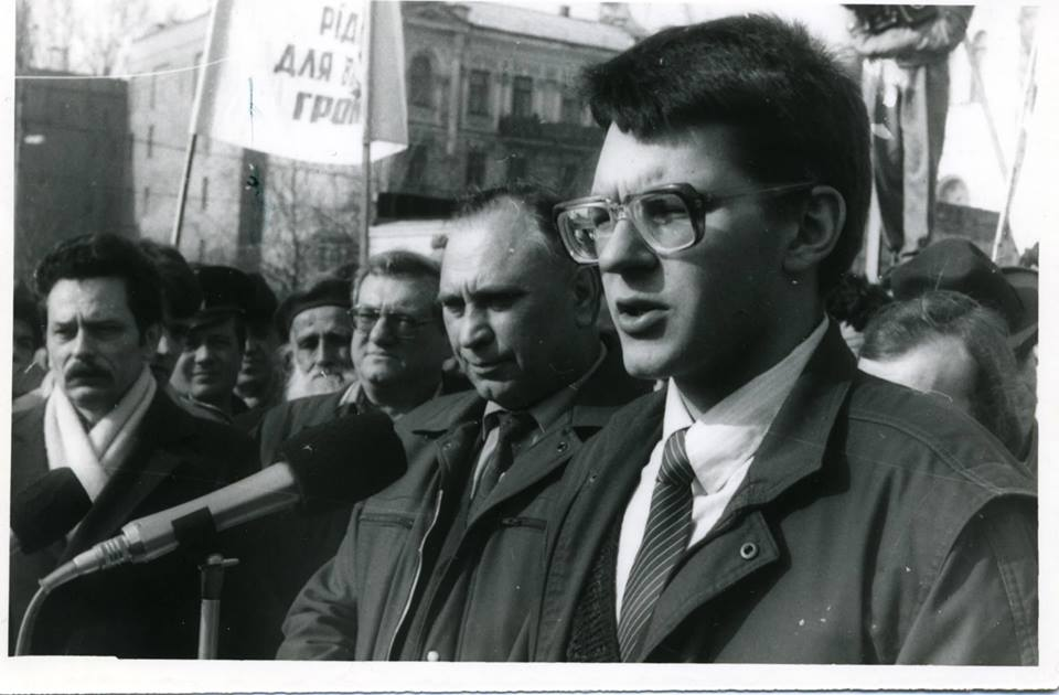 Одарич - член Народного руху